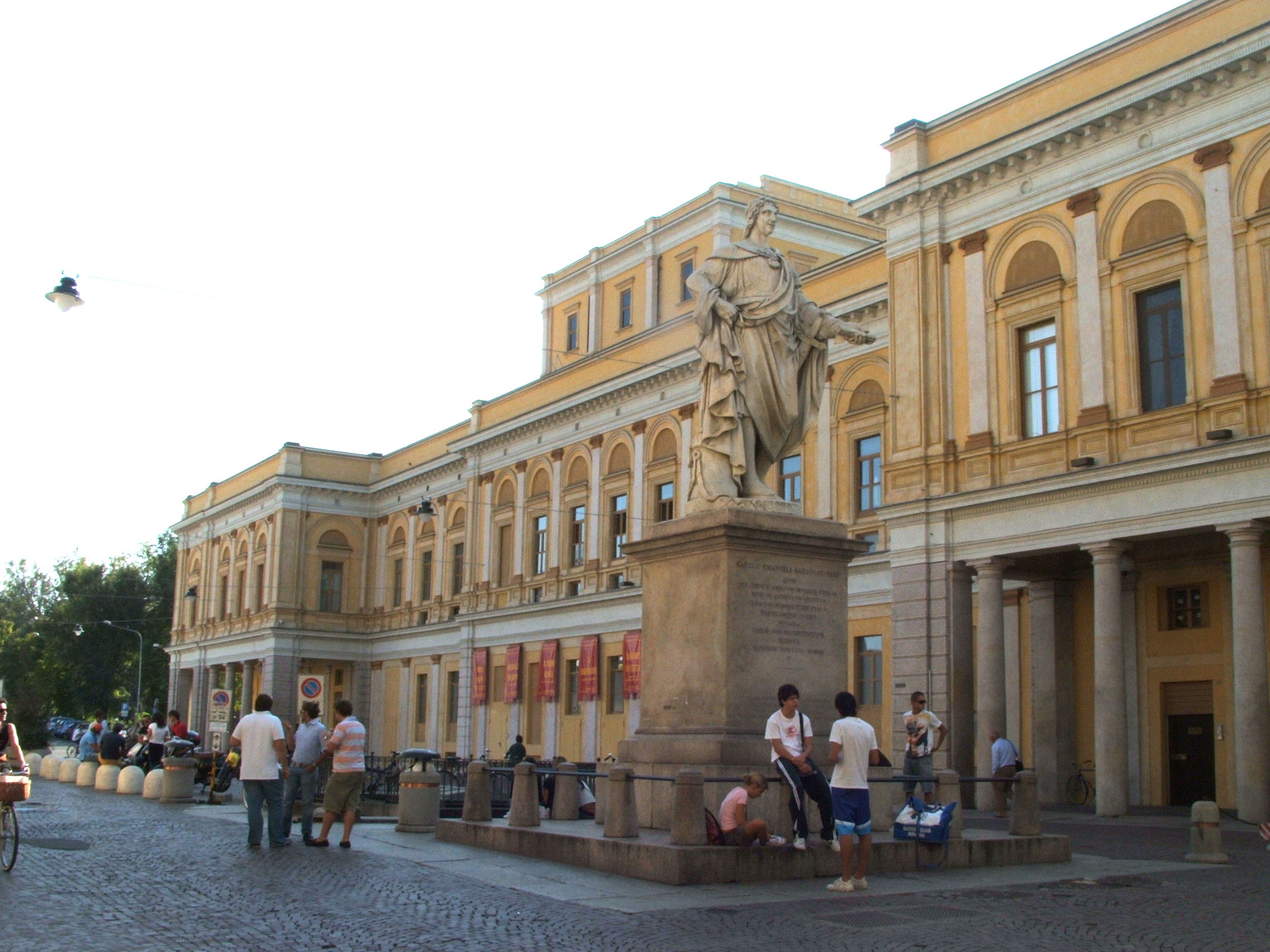 Teatro Coccia a Novara, Piemonte, Italia